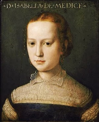 Аньоло Бронзино (1503 - 1572). Портрет Изабеллы Медичи в детстве. Время создания 1552-1554 годы.